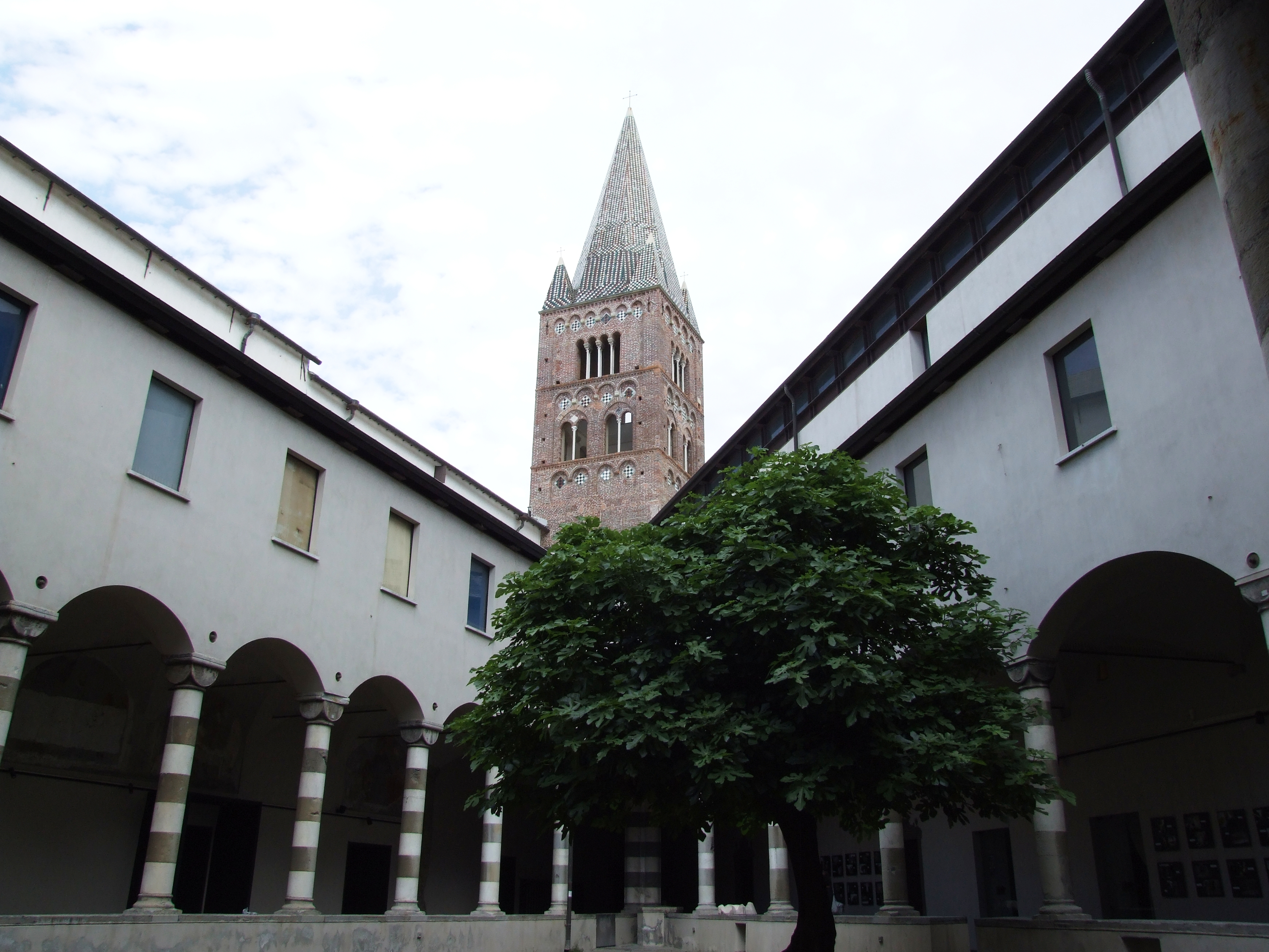 Genova Liguria Italy Castielli